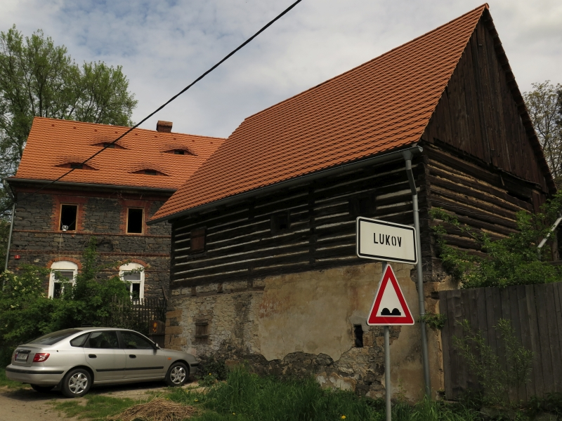 Usedlost čp. 2, Lukov 2, Lukov (Úštěk).